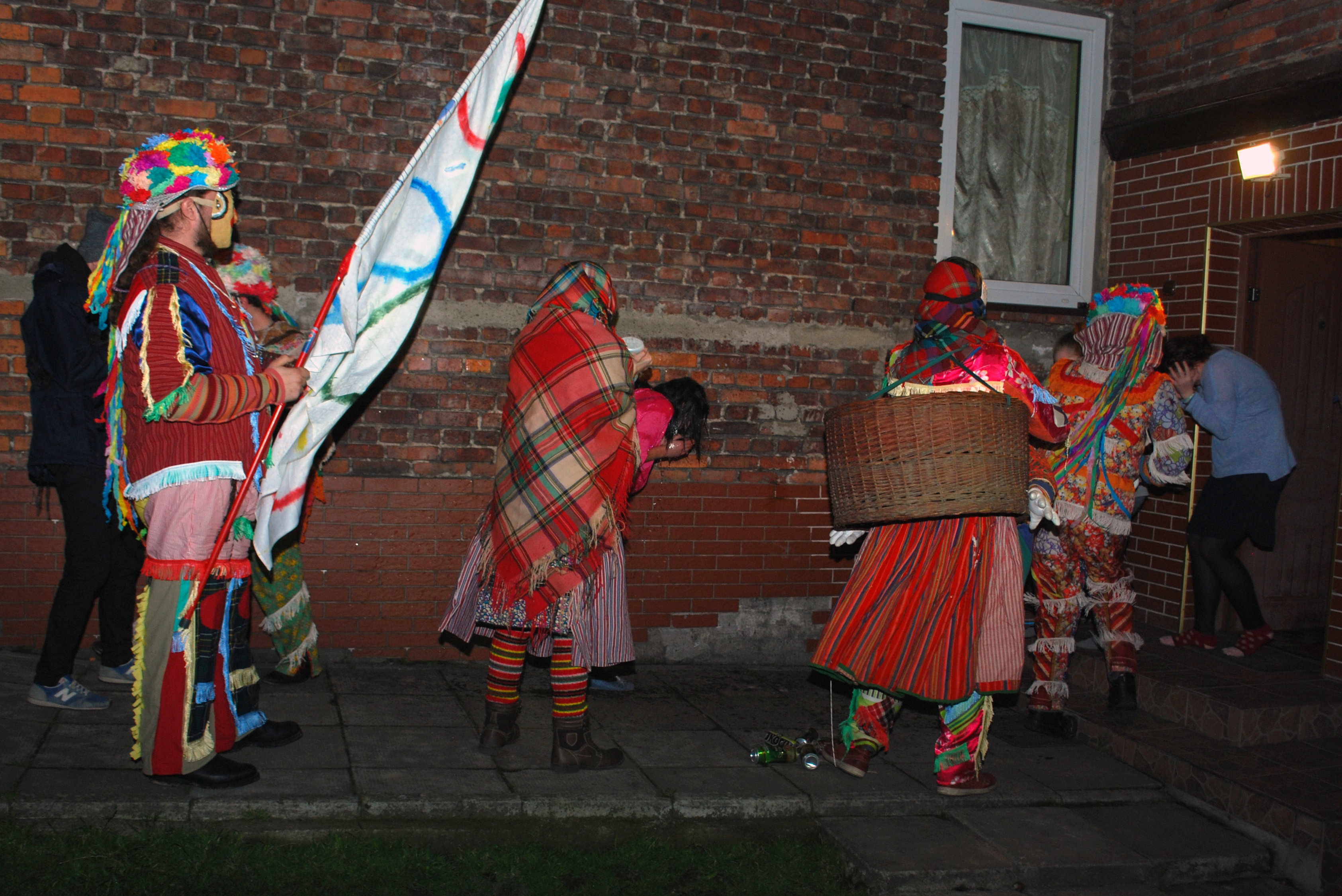 Śmierguśnicy - polewanie panny